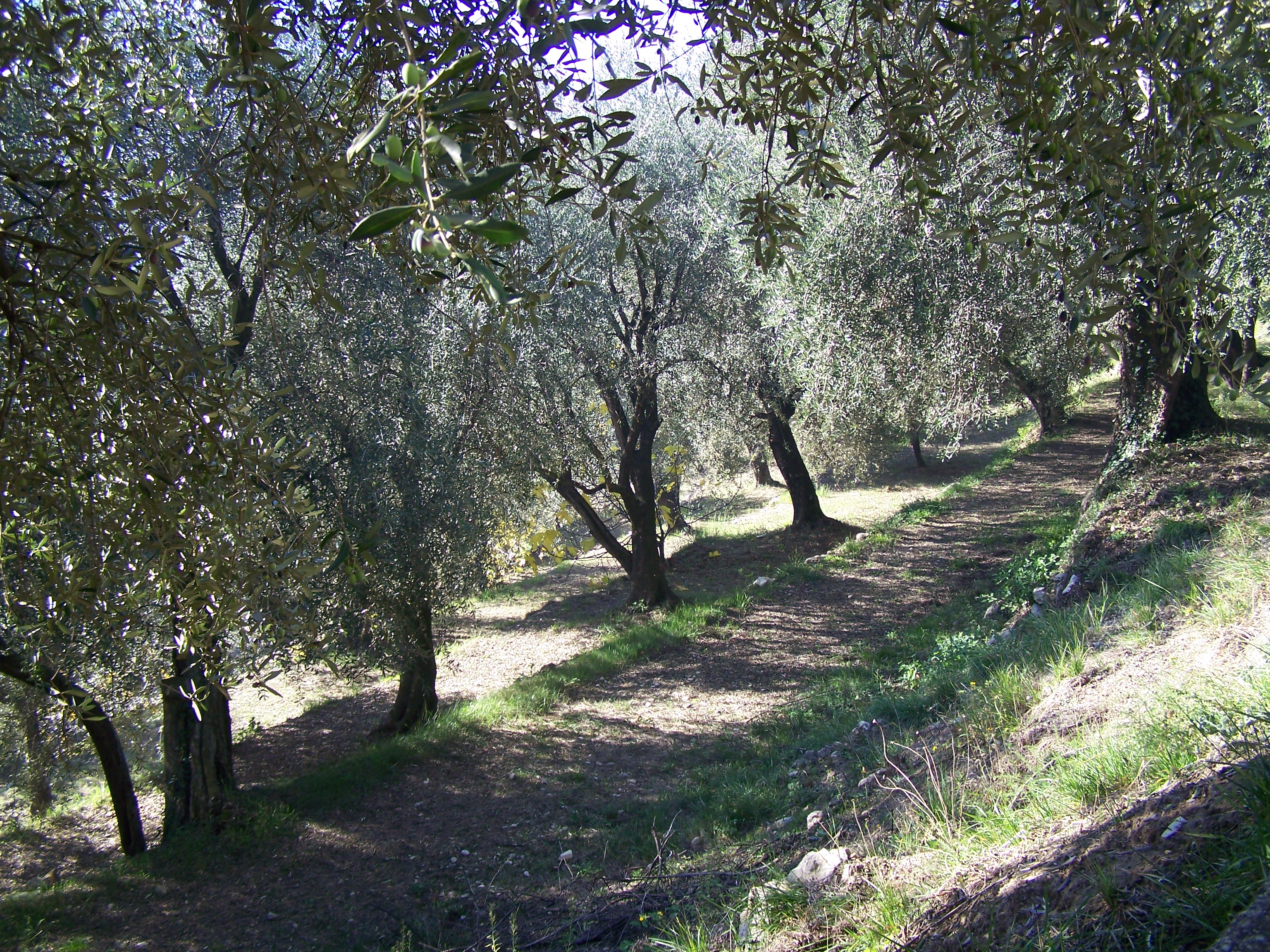 Oliviers "cailletiers" sur des restanques fraîchement labourées dans la commune de Saint-Blaise du département français des Alpes-Maritimes.